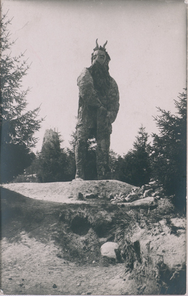 Nõmme Kalevipoeg, "Nõmme kurat"